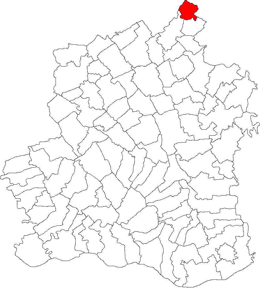 Categorie:Hărţi ale judeţului Teleorman